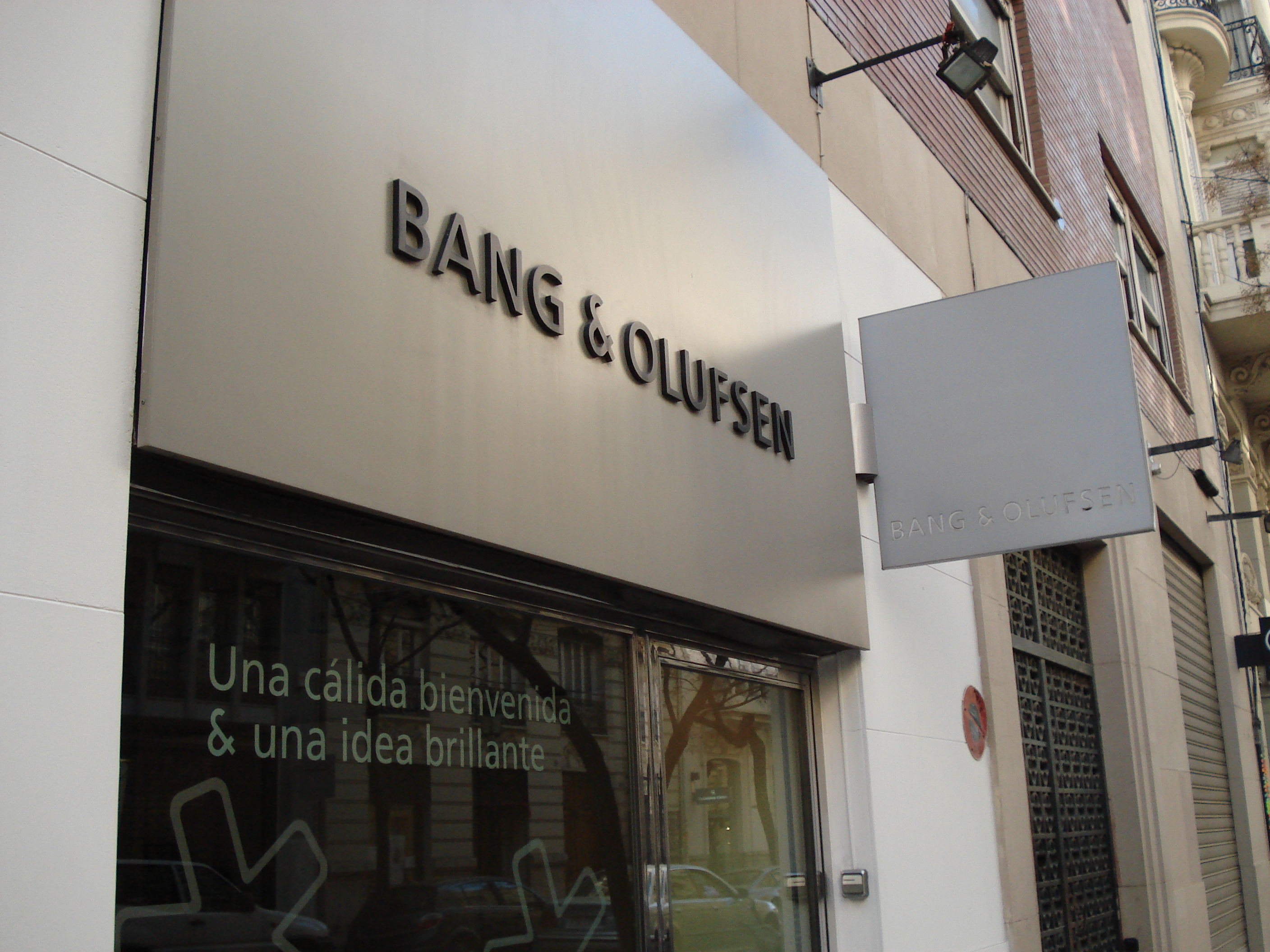 Bang & Olufsen on tunnettu tanskalainen tuotemerkki.